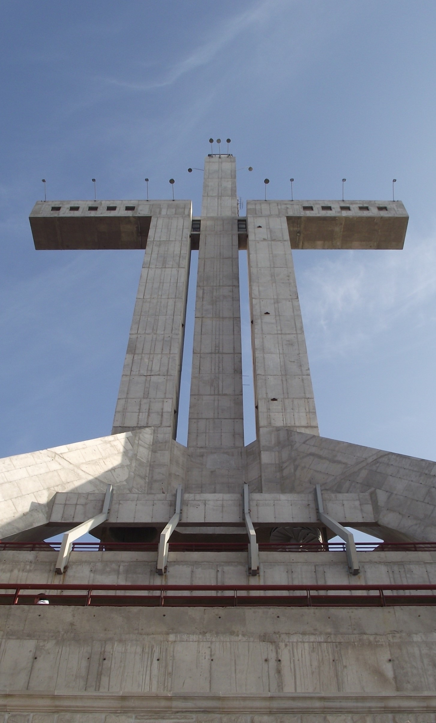 Cruz del Tercer Milenio